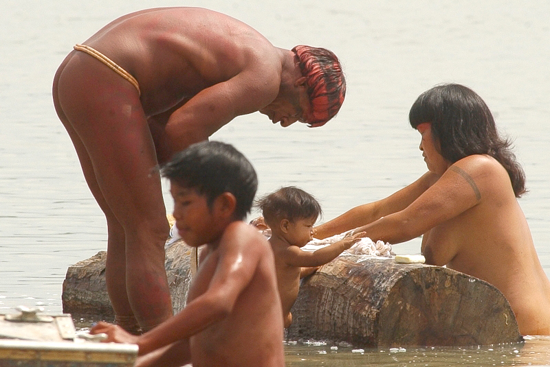 Índios à beira de um rio